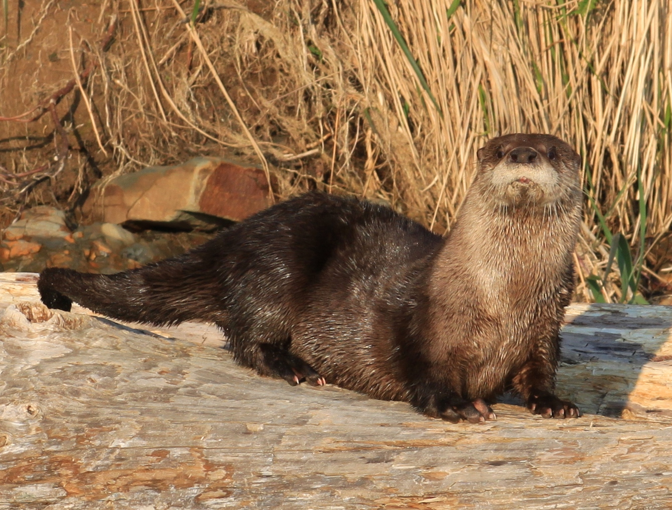 Pacific Otter